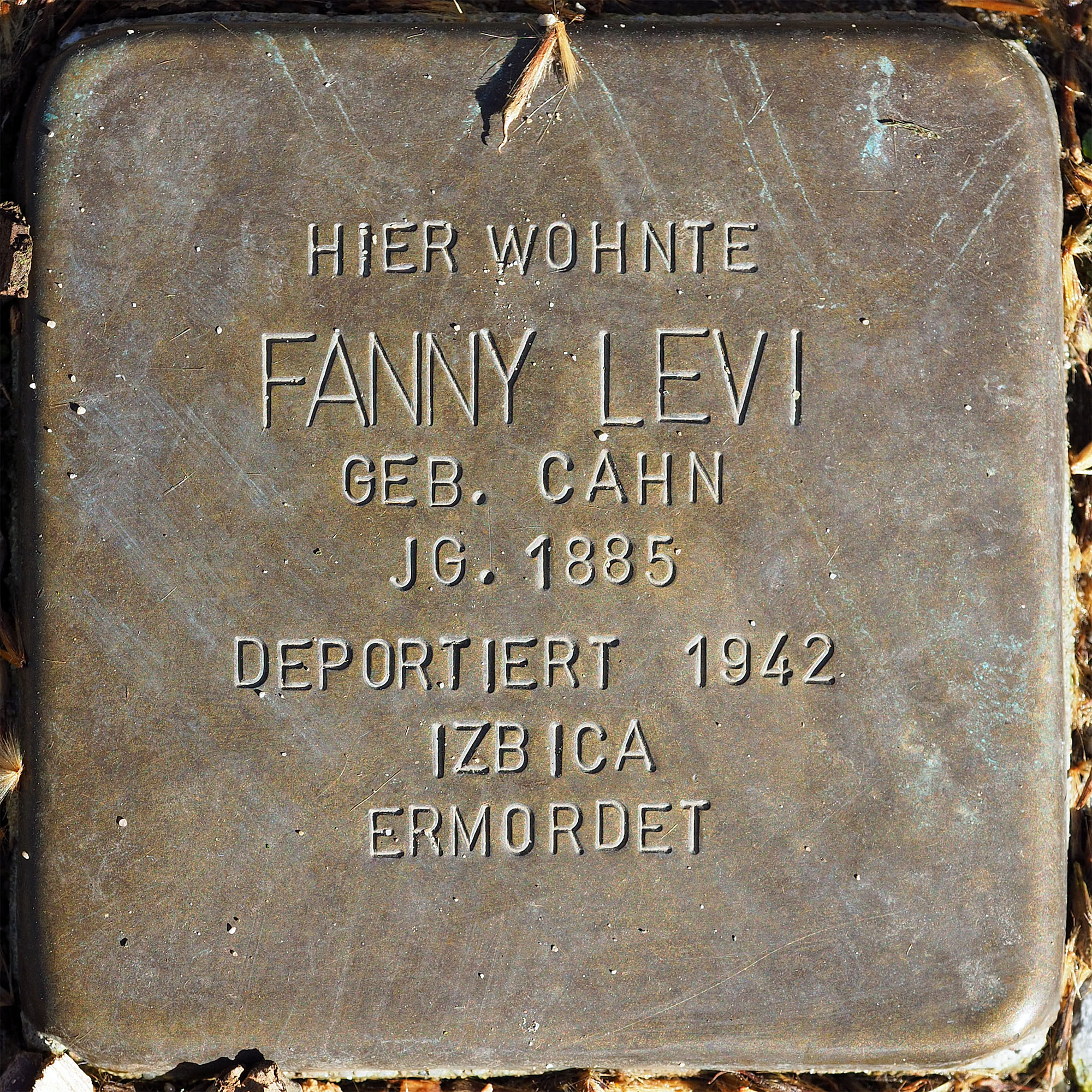 Stolpersteine MG: Levi, Fanny